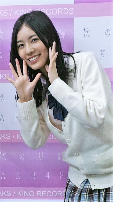 (20140503) 次の足跡 샤메회 in 오사카 (Jurina Matsui)